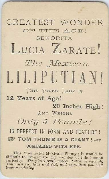 Cartel de presentación de Lucía Zarate